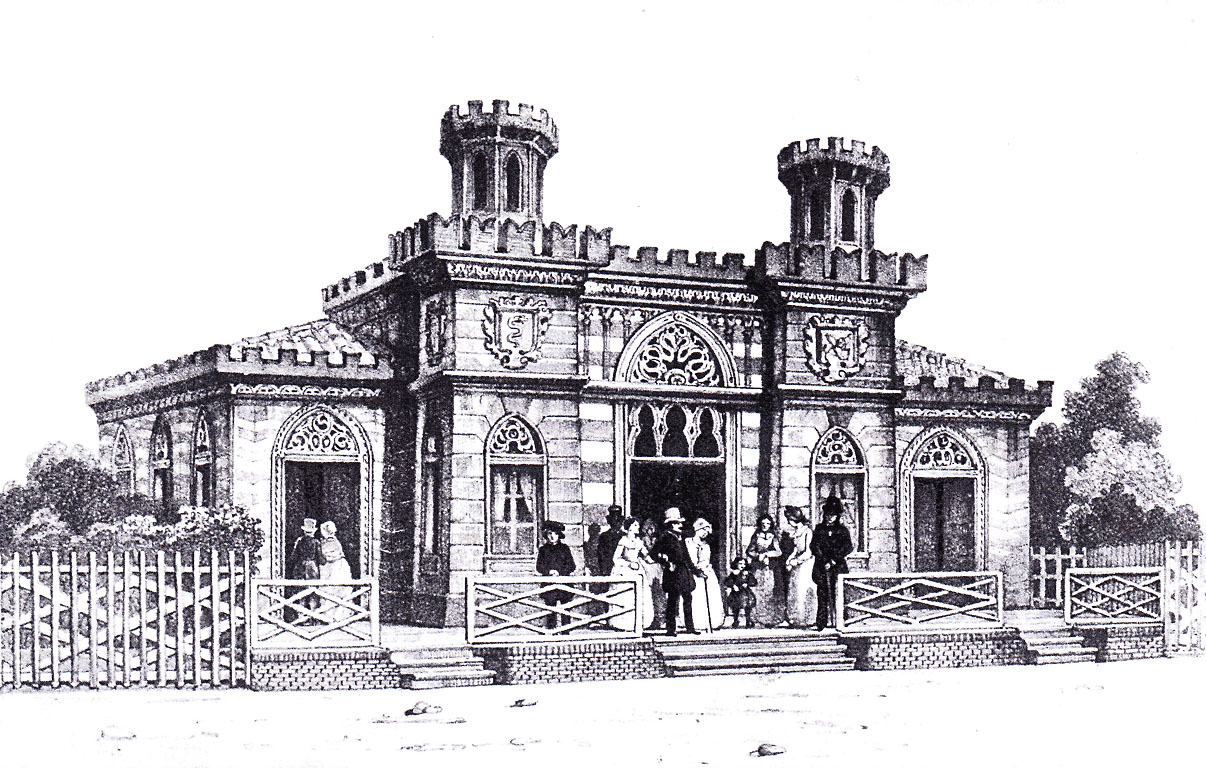 Il fabbricato del caffè Gnocchi alla stazione di Milano Porta Tosa.